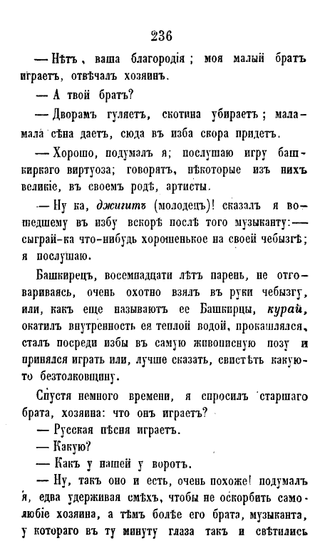 Jeleznov I.I. Ural'cy. Ocherki byta ural'skih kazakov. Tom I. M.,1858. Page 236